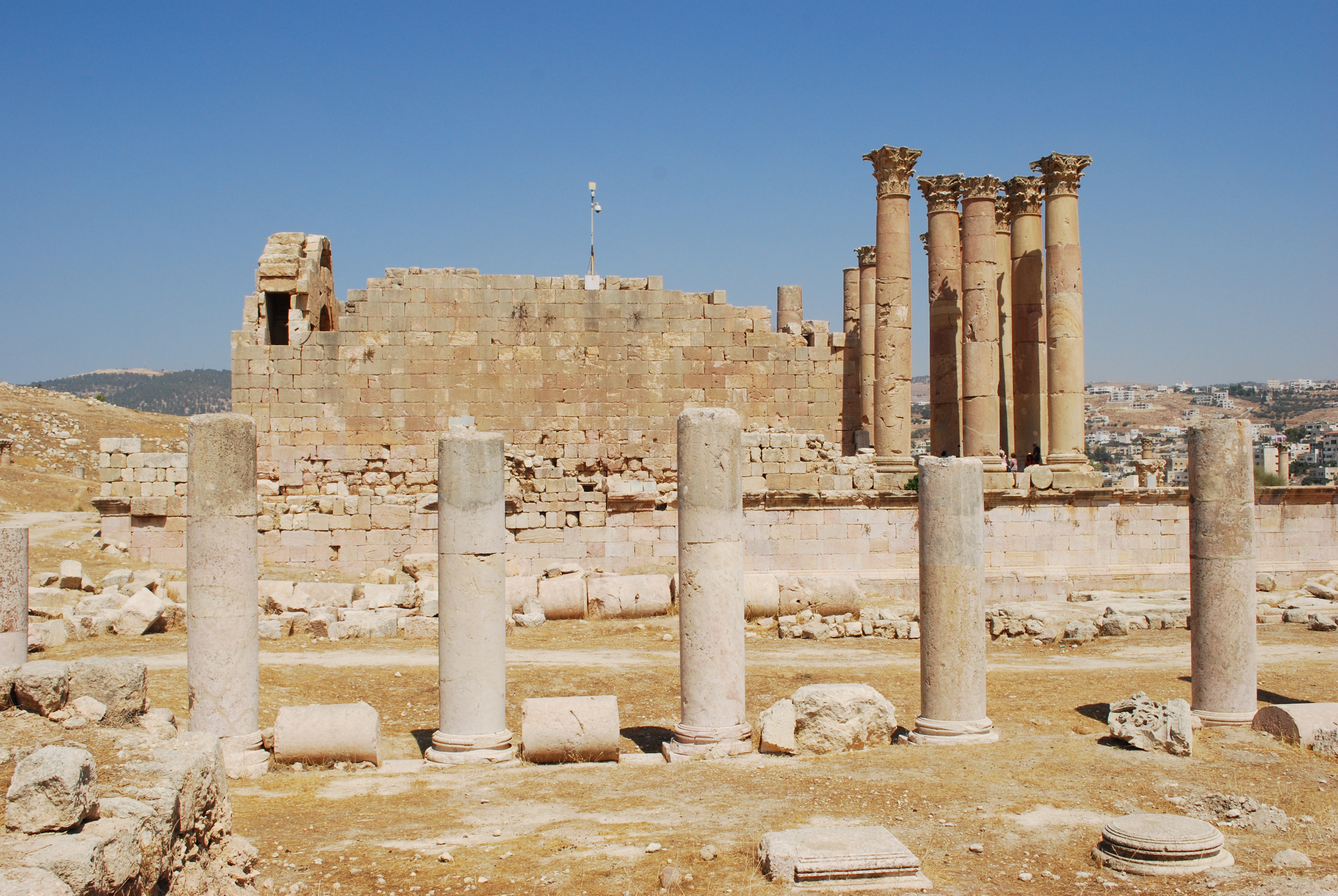 Le temple d'Artemis à Jerash.